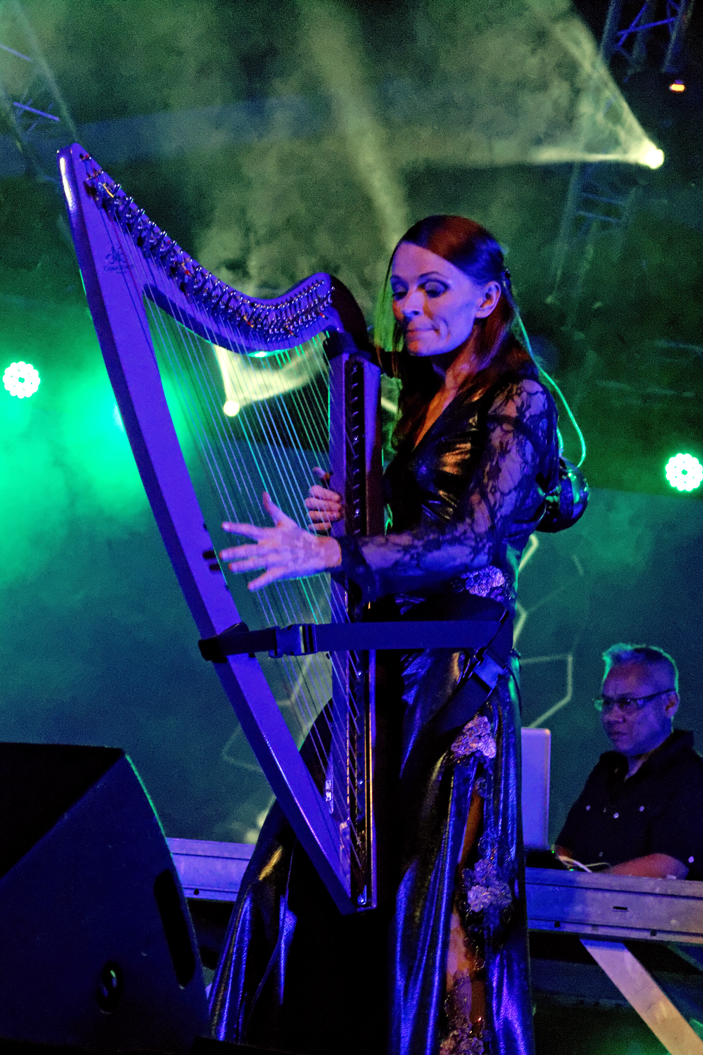 Arneo en concert à l'espace Pierre-Jakez Hélias lors du festival de Cornouaille 2014.